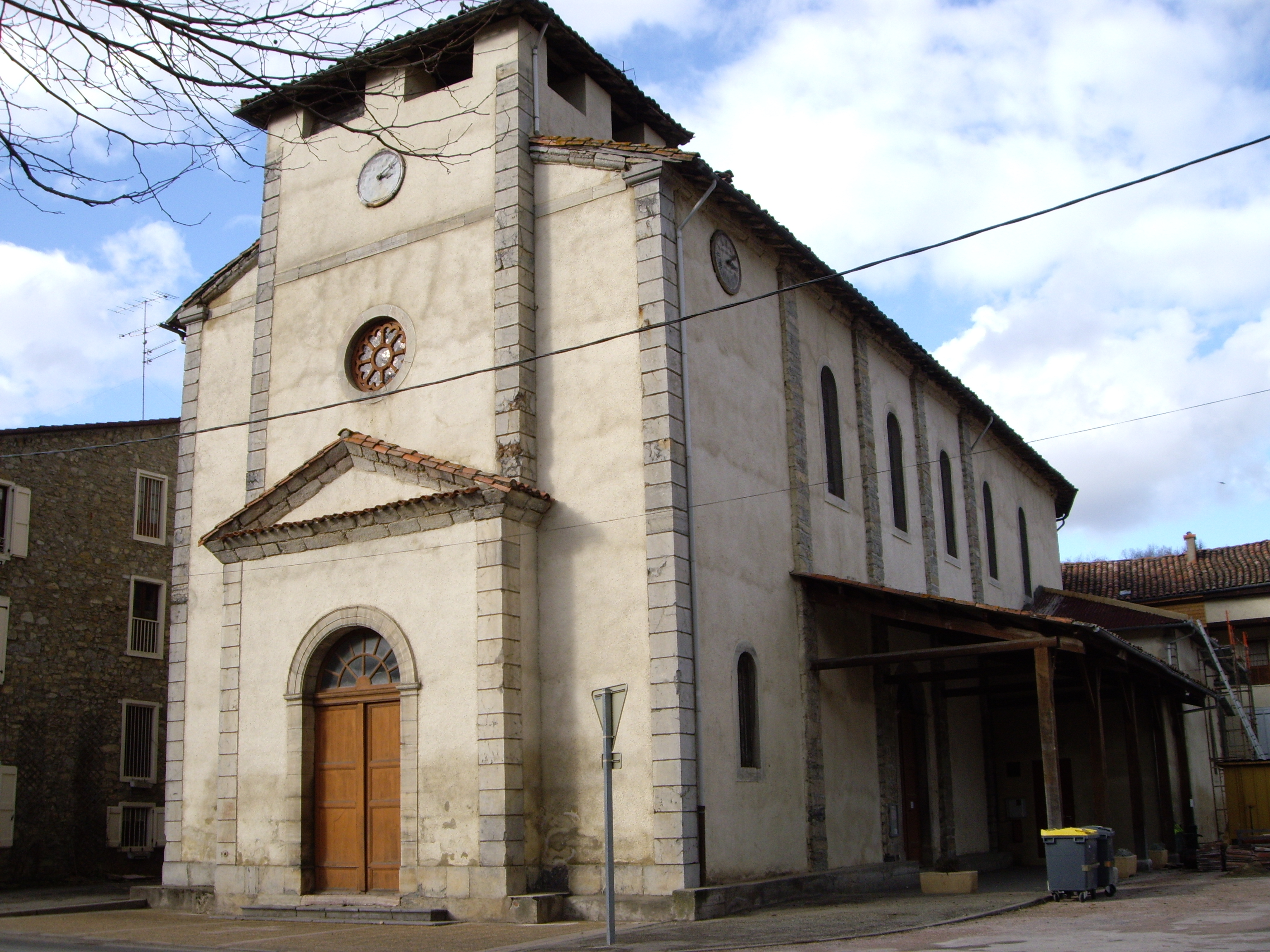 Église de Castelnau-Durban (Ariège, France).